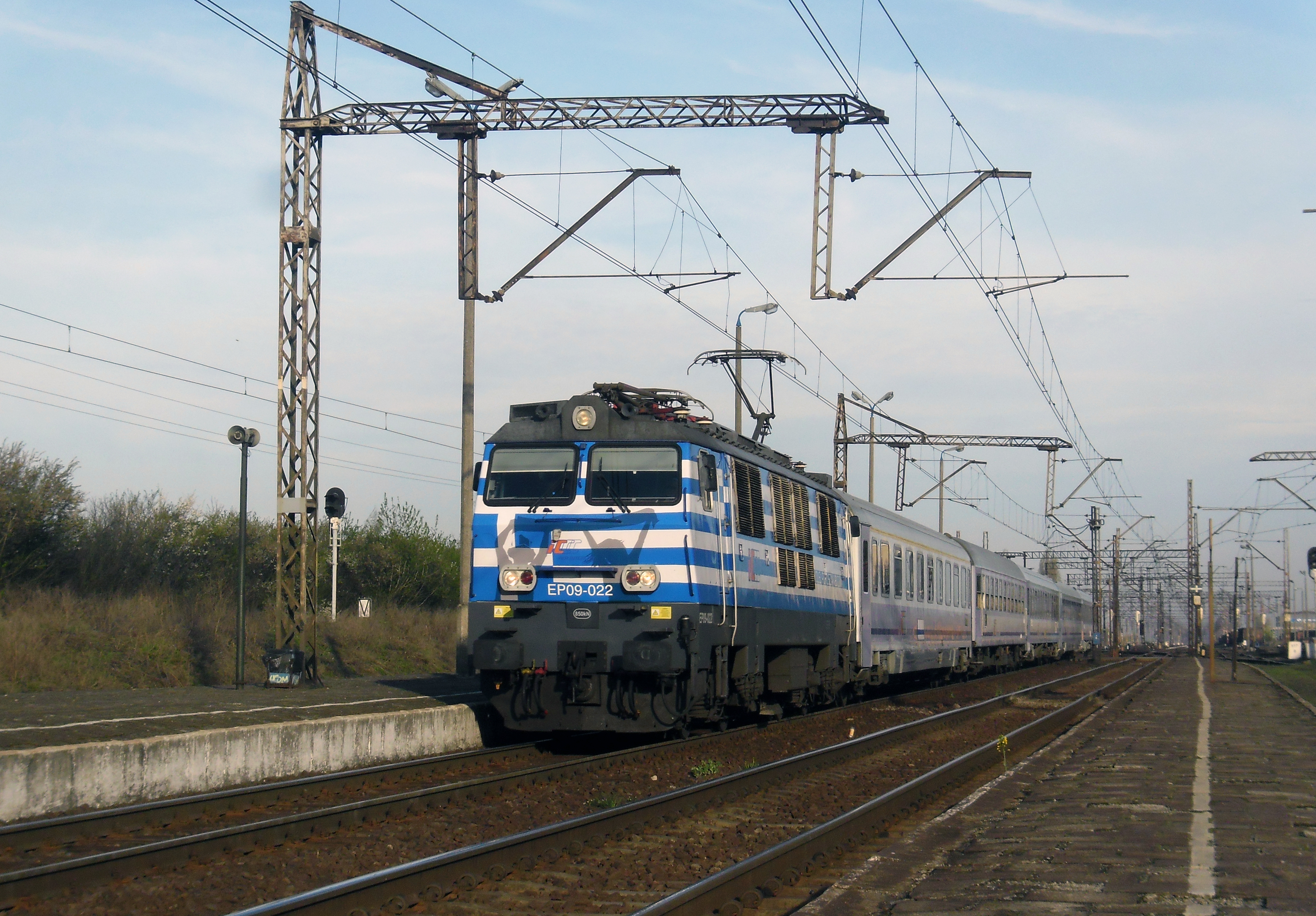 Lokomotywa EP09-022 oklejona w związku z EURO 2012 w barwy Grecji